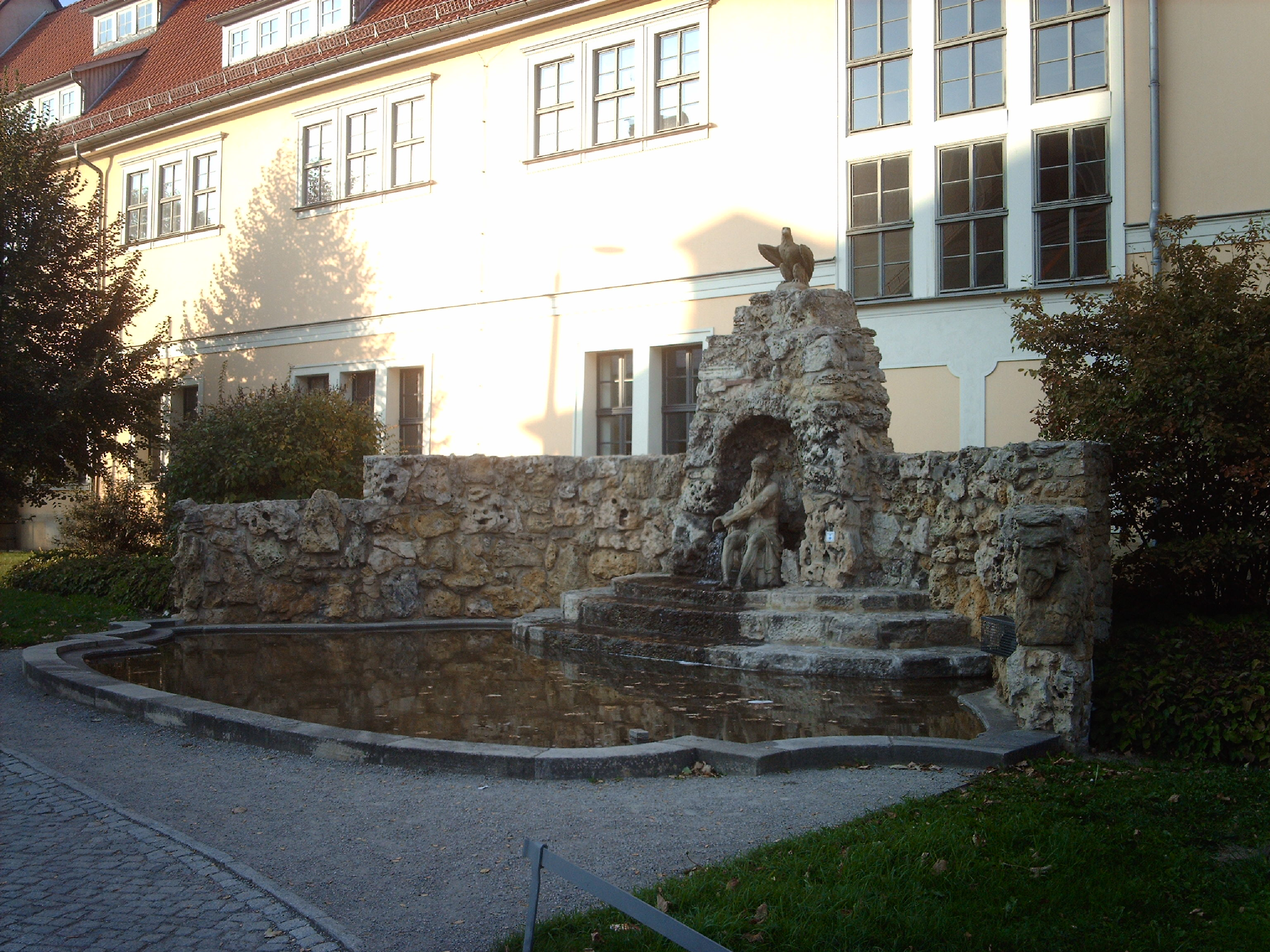 Der Neptunbrunnen in Arnstadt.